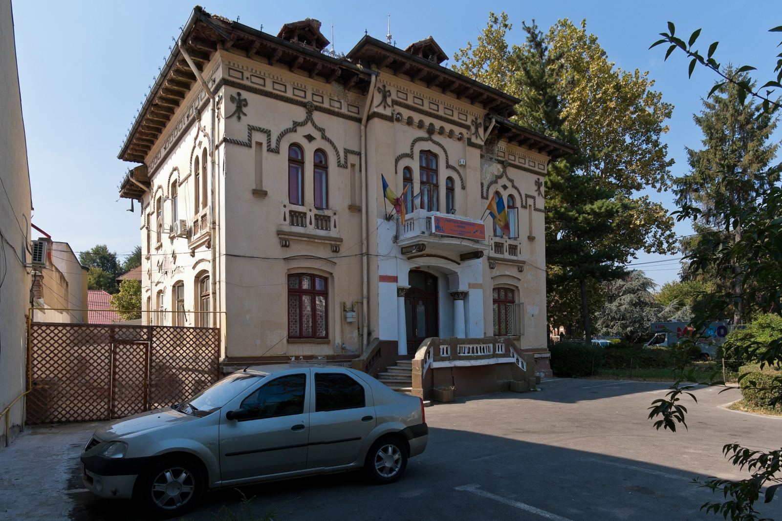 Fotografia prezinta casa Nae Dumitrescu de pe bd. Republicii 58.